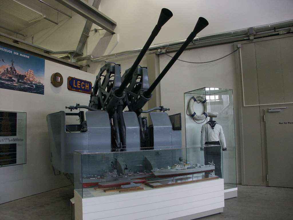 40 mm-Flak L/70 Modell Breda